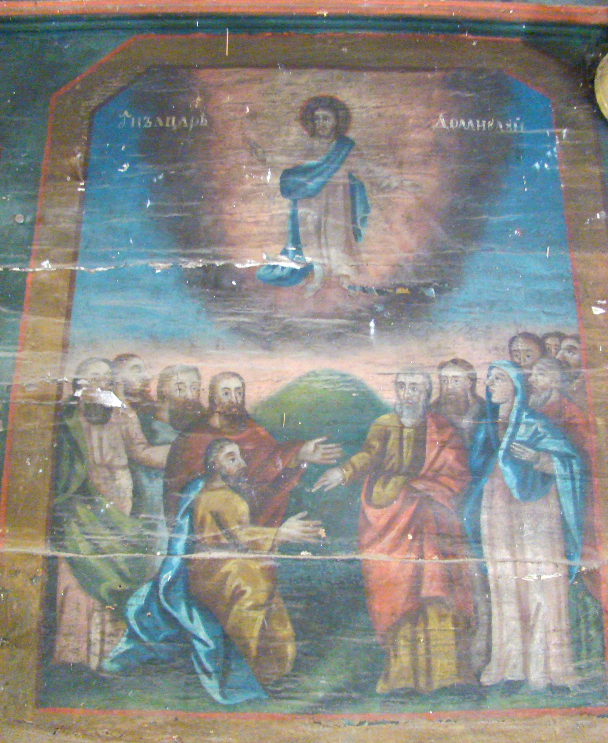 Biserica de lemn „Sfântul Mare Mucenic Gheorghe” din Ionești, județul Arad